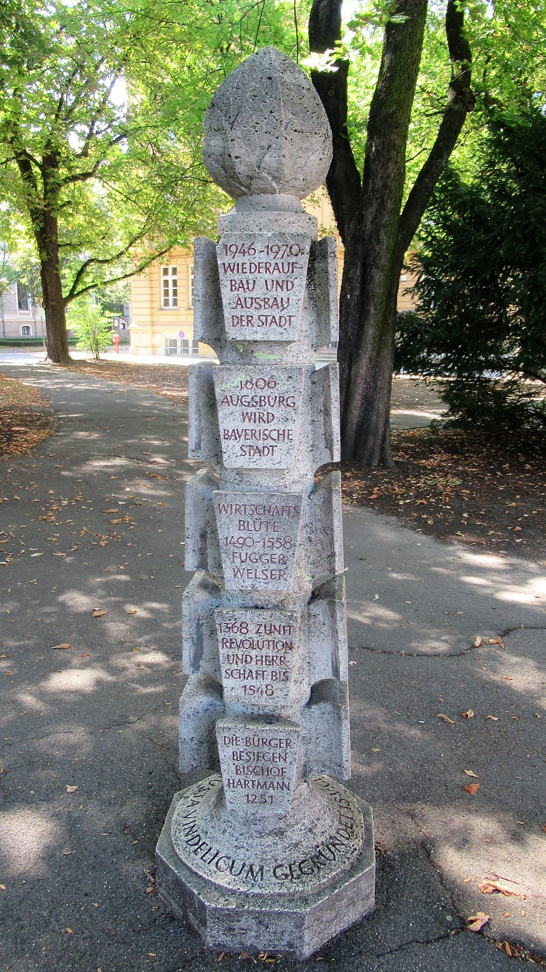 Augsburg-Bahnhofsviertel: „Geschichtssäule“, in der Grünanlage Stadtpflegeranger an der Straße Am Alten Einlaß; im Hintergrund links die Staats- und Stadtbibliothek Augsburg und rechts die „Stadtpflegeranger-Schule“ (St.-Anna-Grundschule).